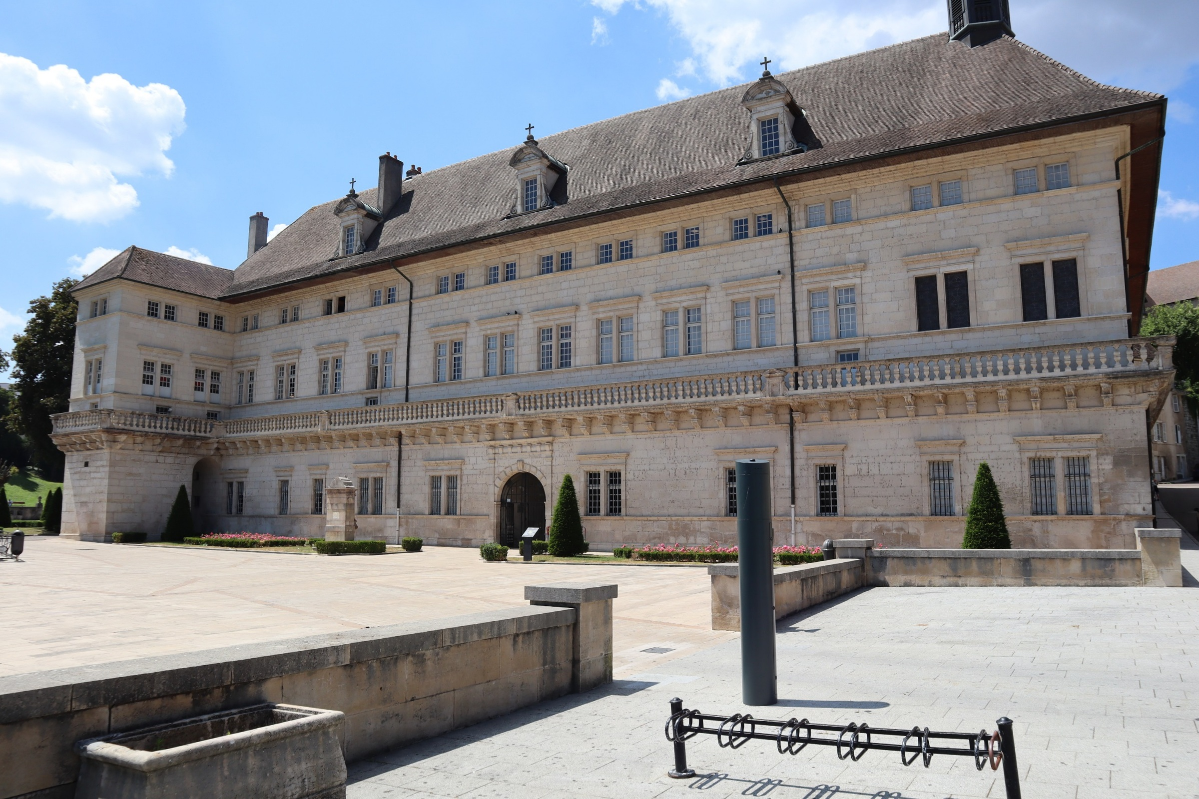 Extérieur de l'Hôtel-Dieu de Dole (39).